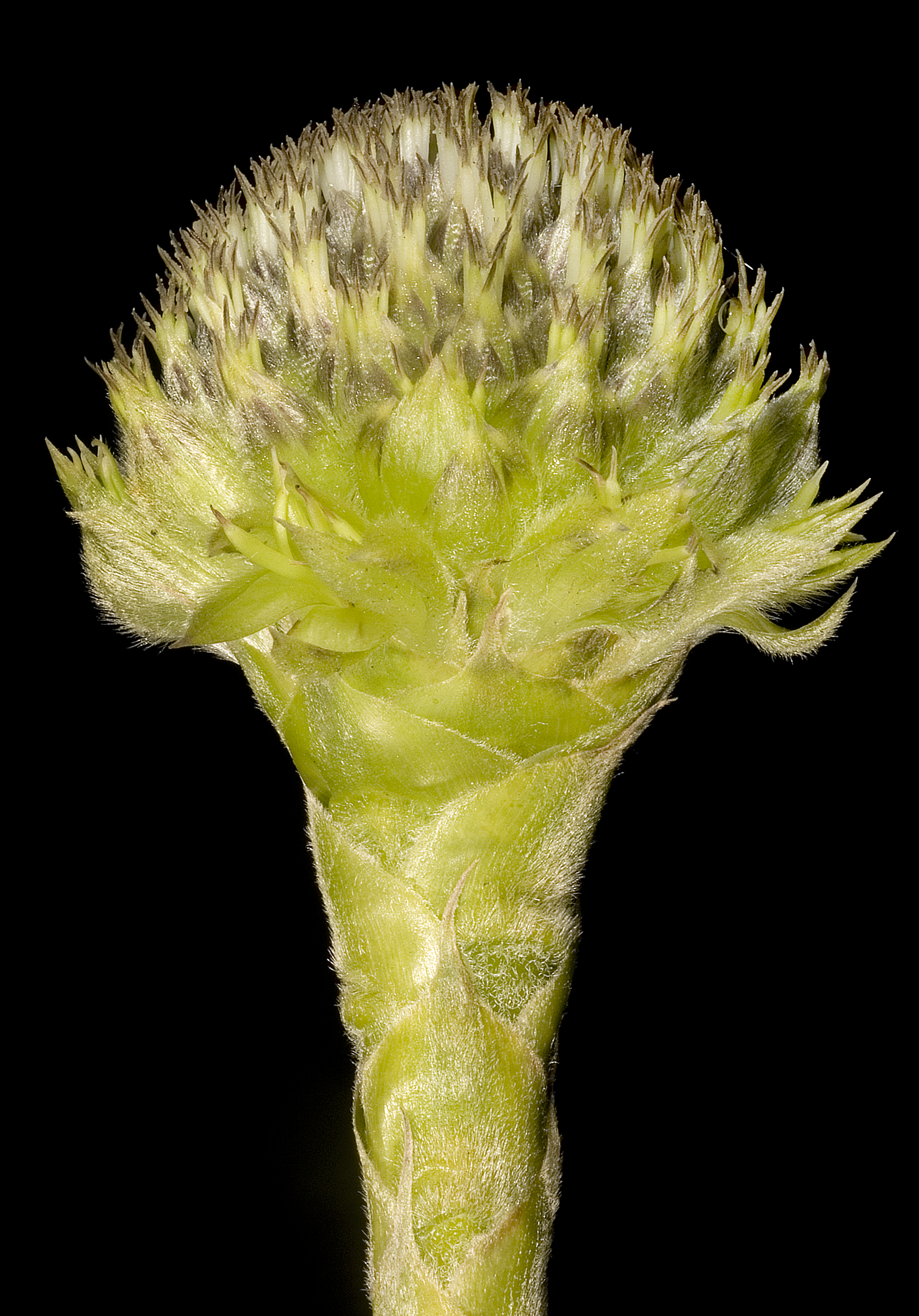 KRT3796